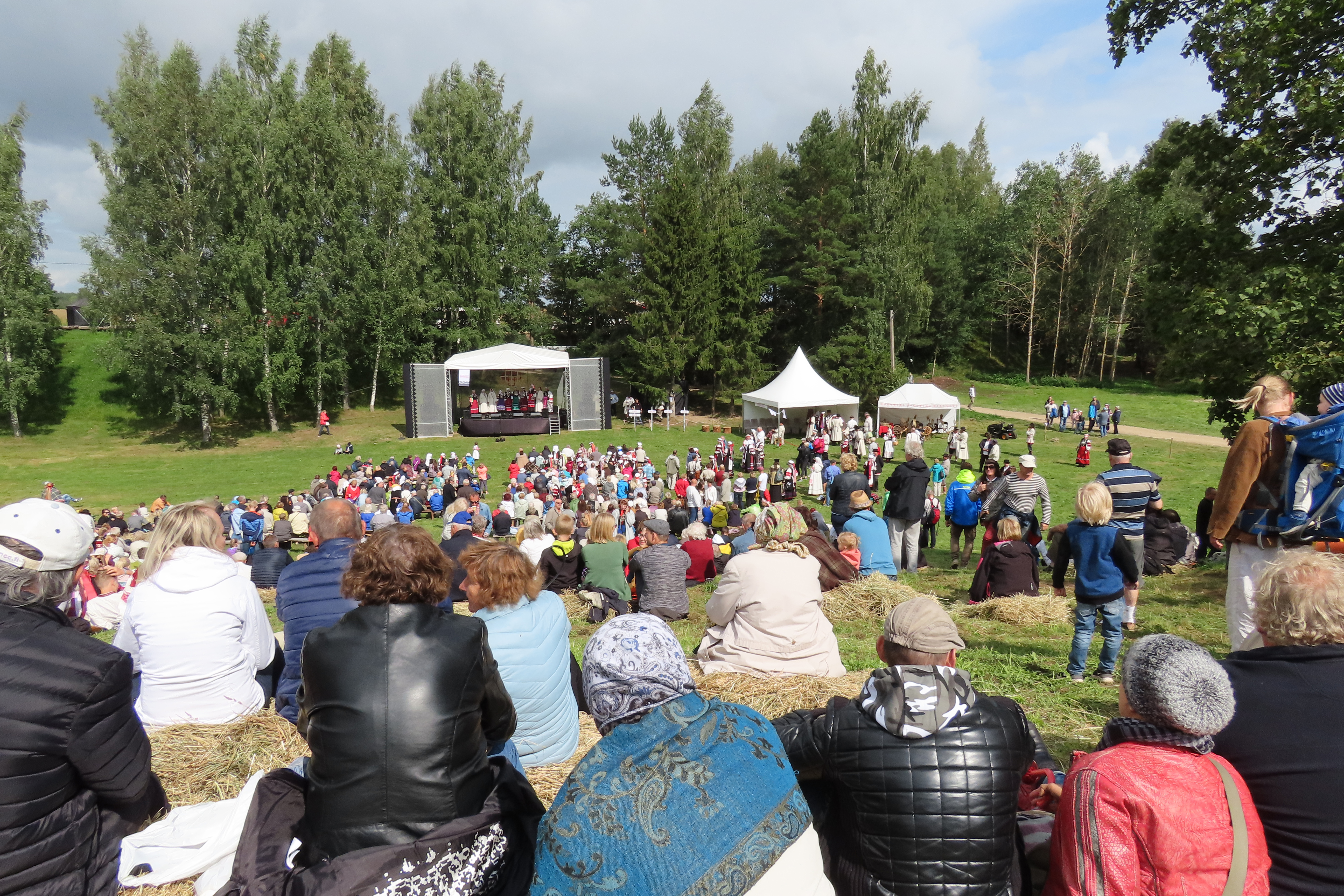 Seto kuningriigi päev 2019. aasta augustis Küllätüvä külas